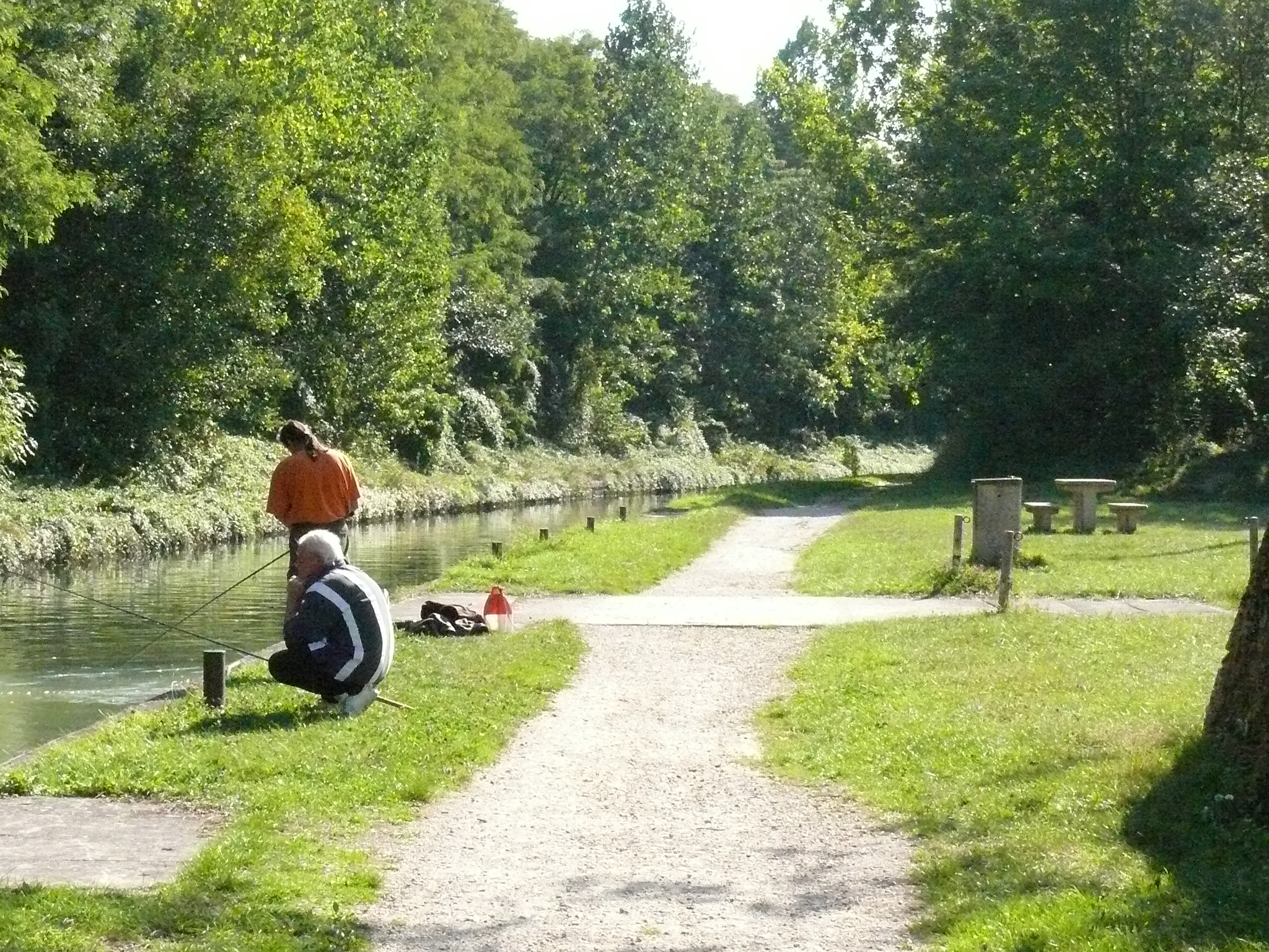 Le Canal de l'Ourcq à Trilbardou (Seine-et-Marne - Île-de-France - France)